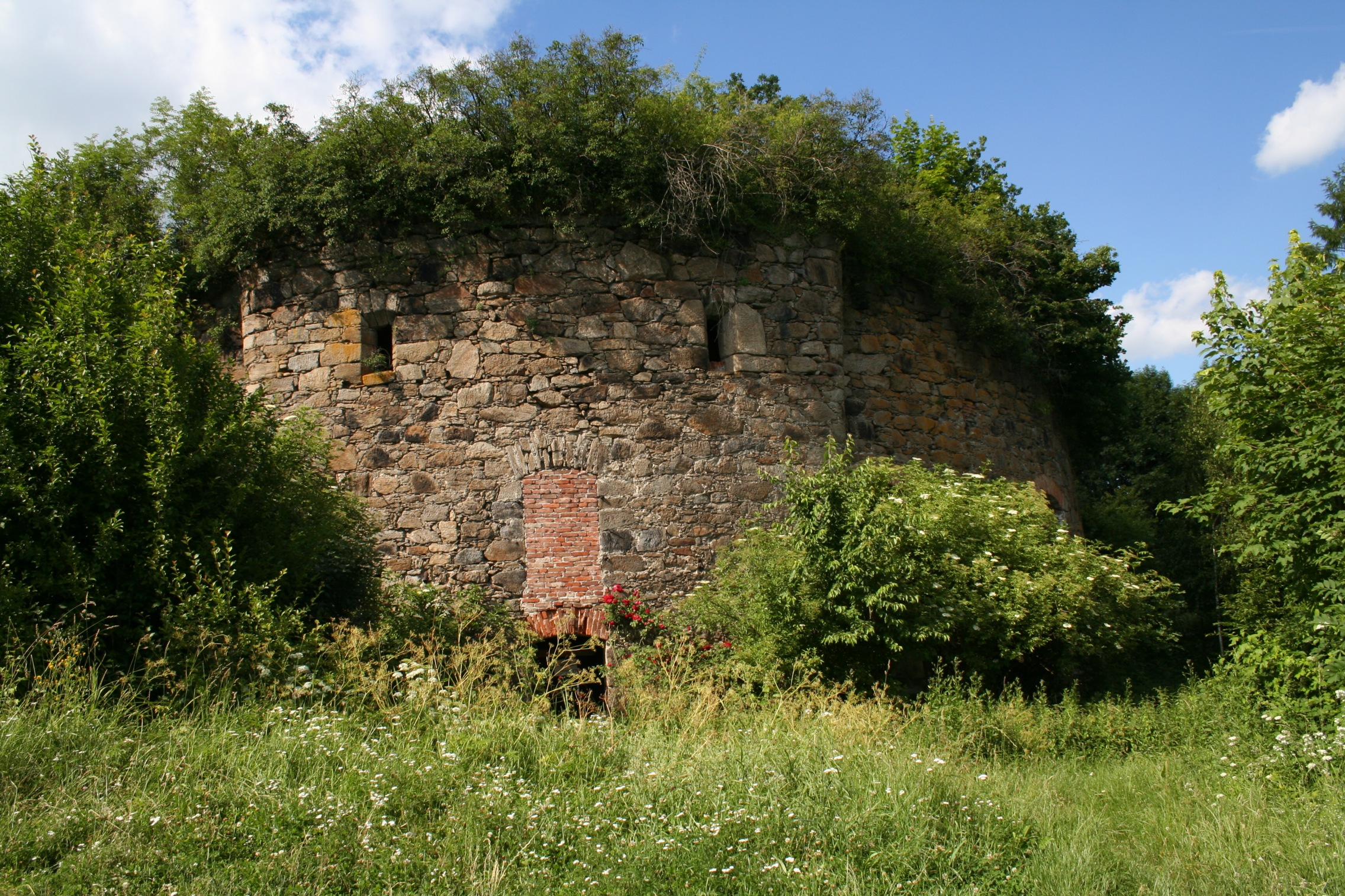 Turm 20 der Linzer Turmlinie. Blick auf die Kehle.